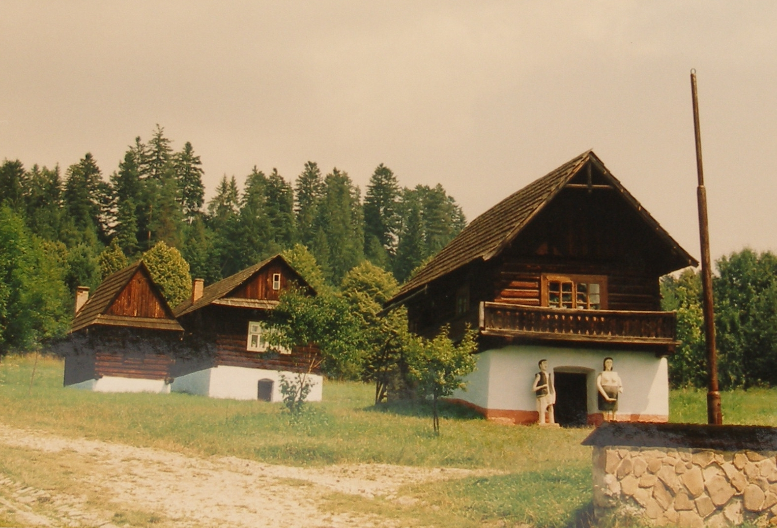 Skanzen Slovenská dedina pod hradom v Starej Ľubovni rok 2005, región Spiš.